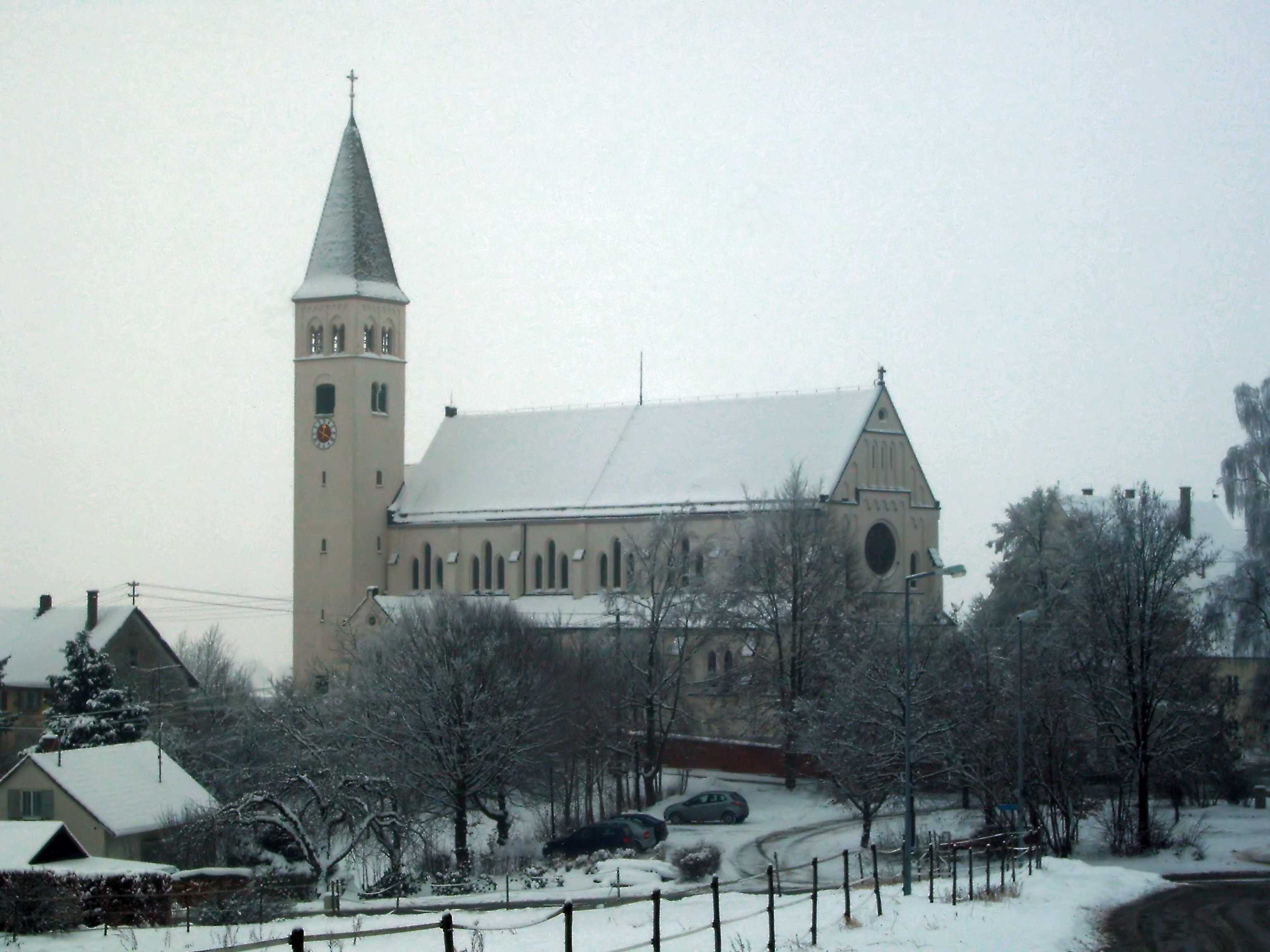 Kirche St. Martin in Kirchberg an der Iller